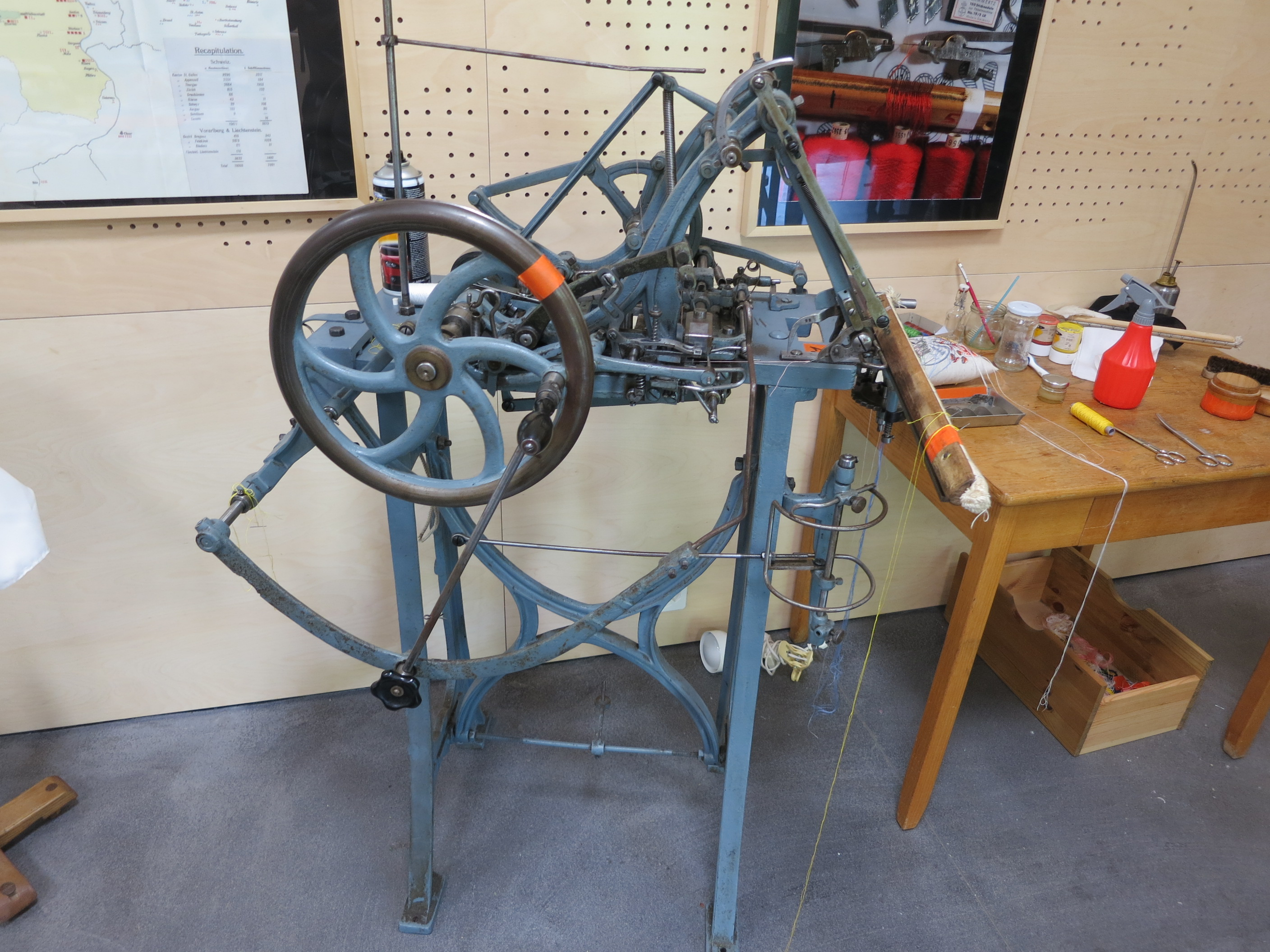 Fädelmaschine, Museum Industriekultur Neuthal, Bäretswil ZH, Schweiz